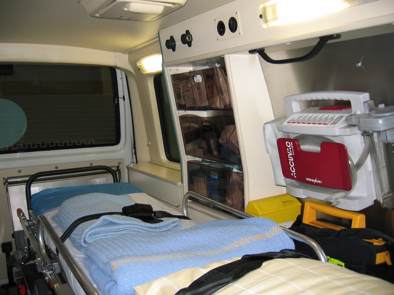 Innenraum eines Krankenwagens (KTW) des Arbeiter-Samariterbundes Österreich, Modell VW T4 Transporter ohne Hochdach